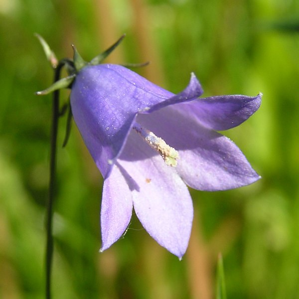 Blüte einer Glockenblume (Campanula spec.)